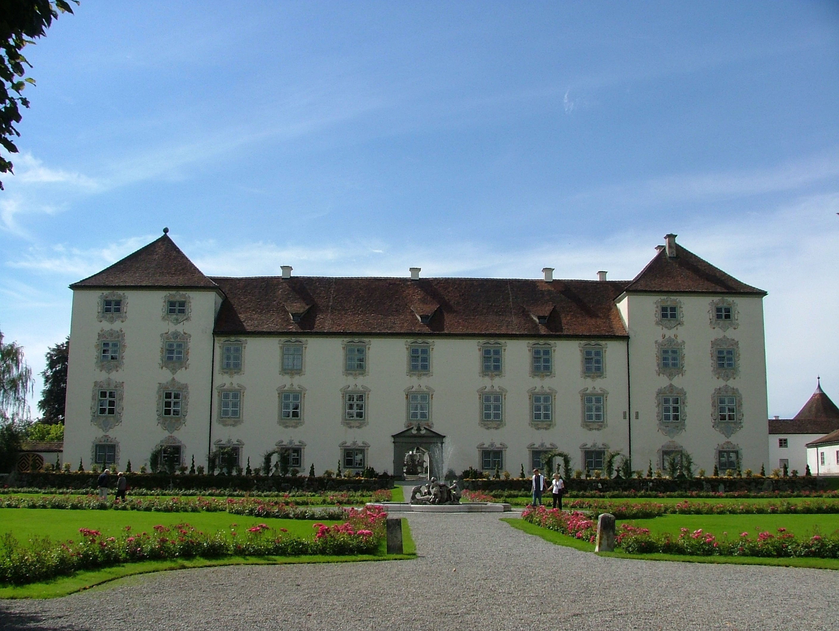 Schloss Zeil Nordseite